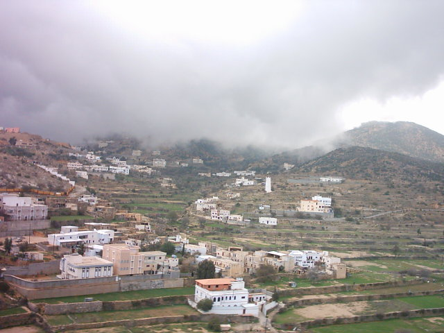 ال طلحة